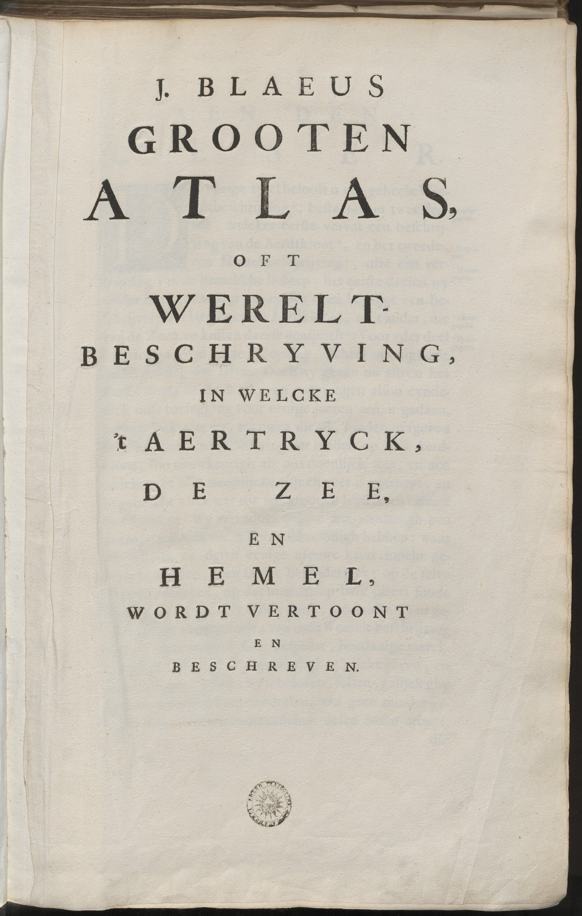 Grooten atlas, oft wereltbeschryving, in welcke ’t aertryck, de zee en hemel, wordt vertoont en beschreven